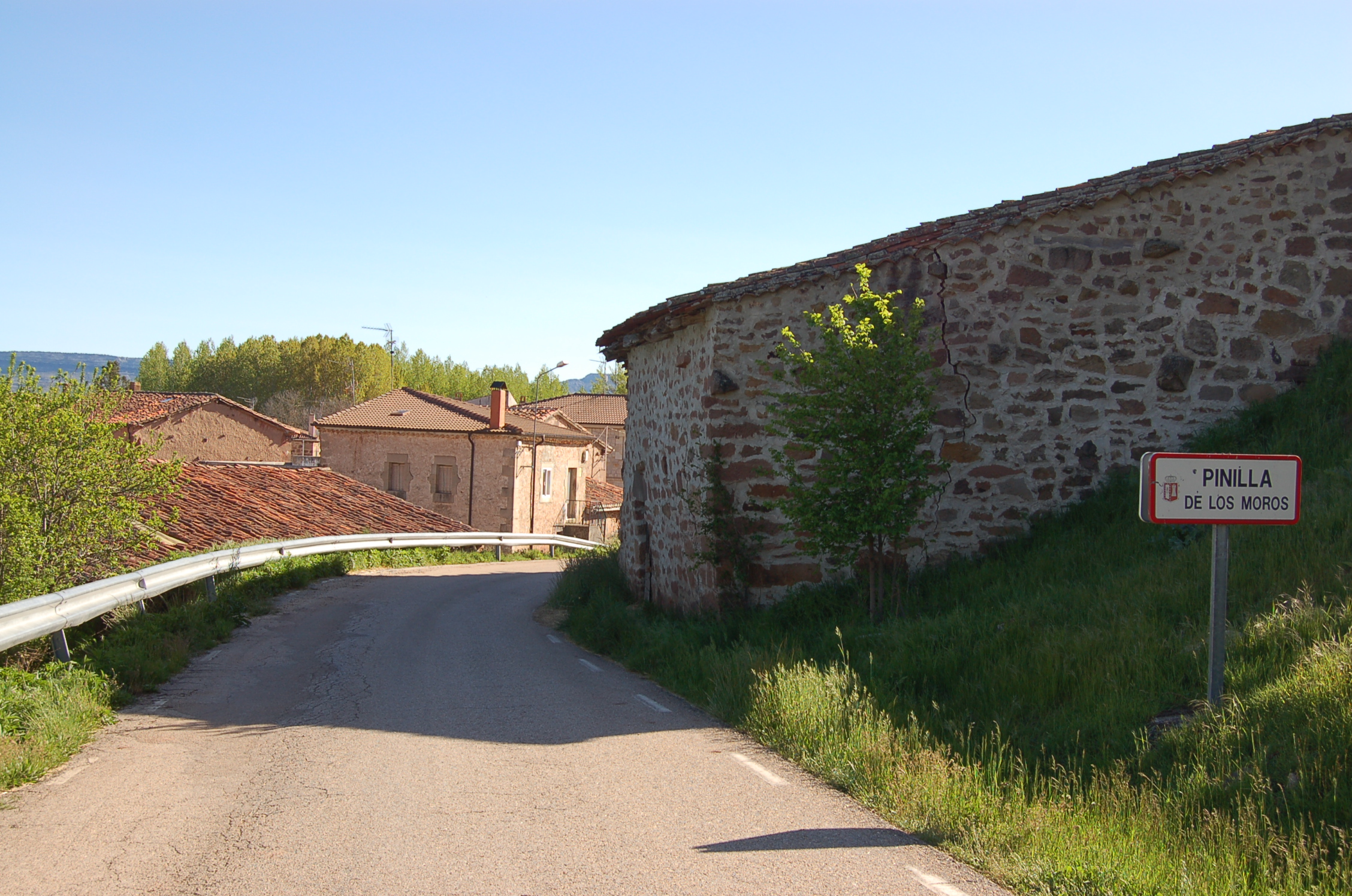 Acceso a Pinilla de los Moros desde la carretera BU-V-8205 por el noreste